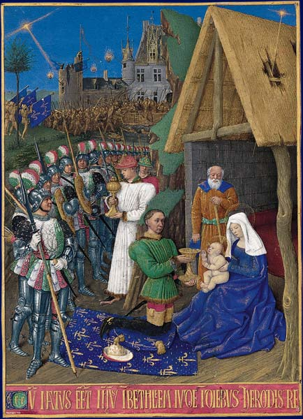 Les trois rois mages s'approchent de la crèche où se trouvent Joseph et la Vierge tenant le Christ sur ses genoux. Devant eux est agenouillé l'un des rois représenté sous les traits de Charles VII, sur un tapis fleurdelysé, un chapeau à ses pieds et entouré de gardes armés. En arrière plan est représentée une bataille proche d'un château, surplombée par une étoile. Cette miniature illustrait le début de l'extrait de l'évangile selon saint Matthieu du livre d'heures.